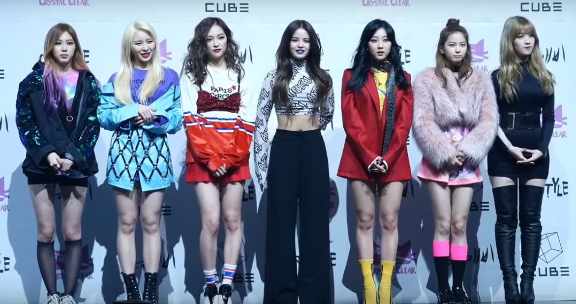 170116 씨엘씨CLC - 미니5집앨범 쇼케이스 포토타임PhotoTime by drighk 직캠fancam- New Best